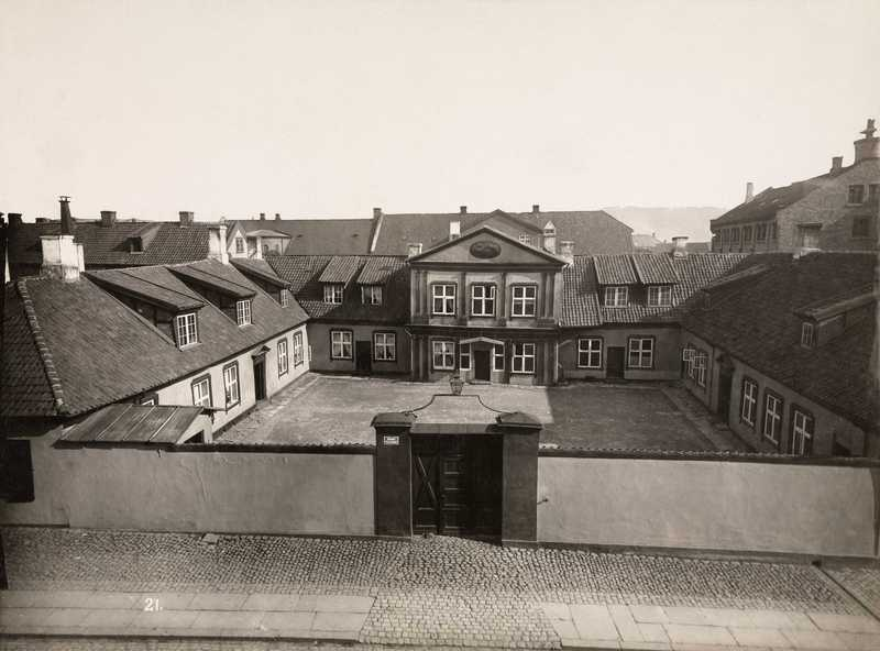 Mangelsgården, gårdsplass, sidefløyer.